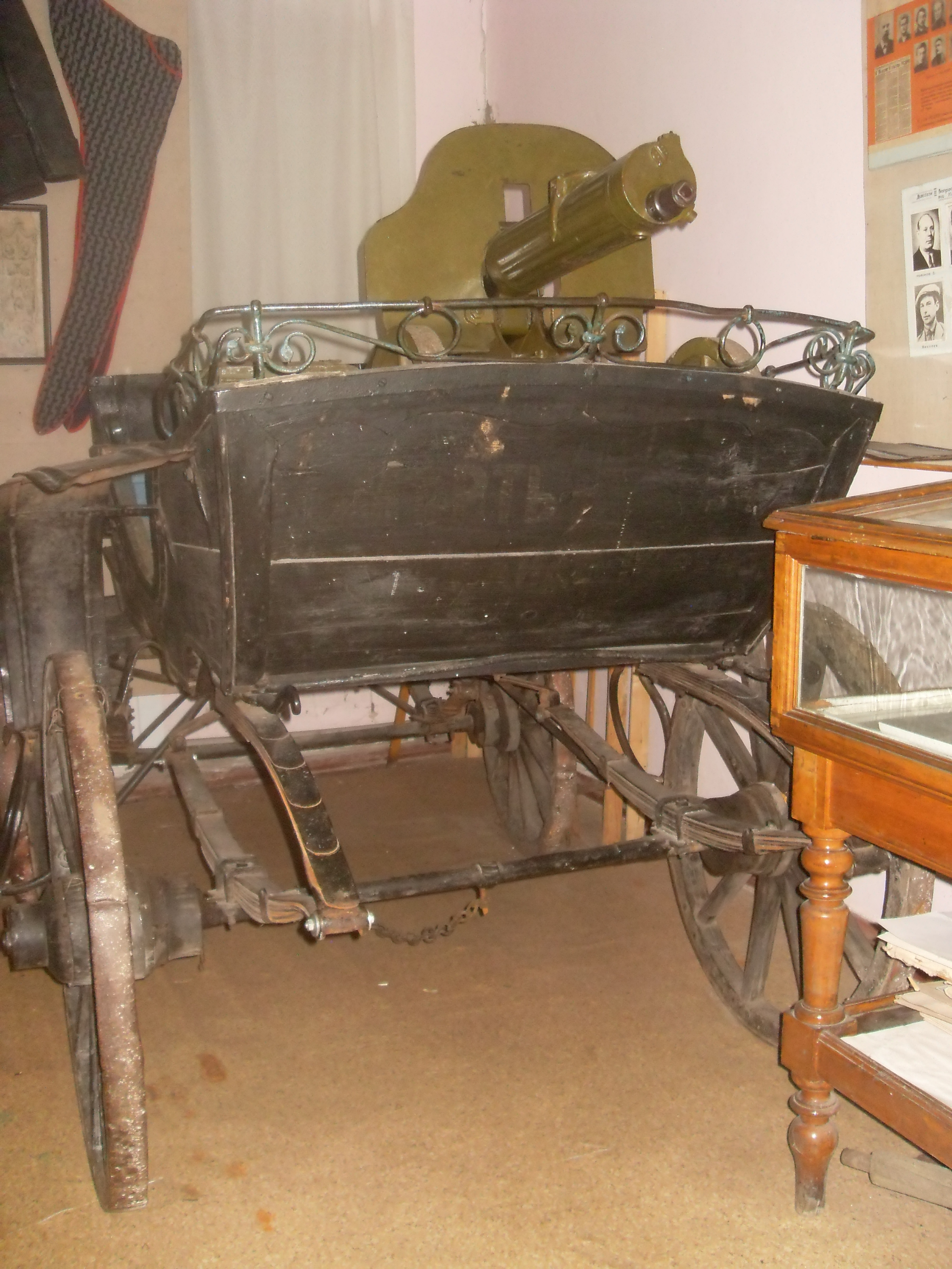 Махновська тачанка в Покровському районному народному історико-краєзнавчому музеї